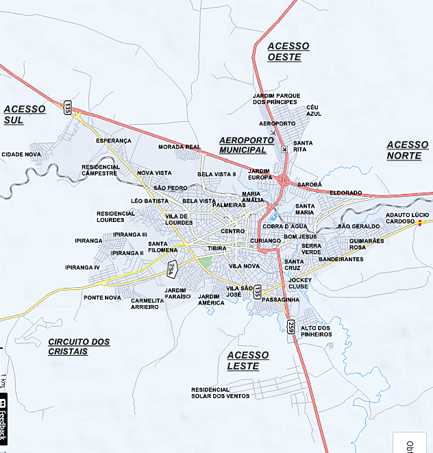 Mapas